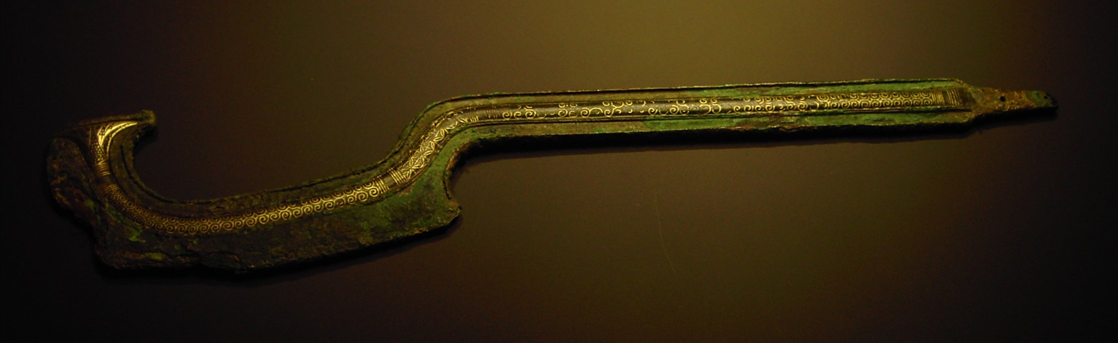 Sichelschwert (Khopesh) aus Sichem (Nablus); Einlagen aus Elektron, um 1750 BC, Staatl. Museum Ägyptischer Kunst, München.